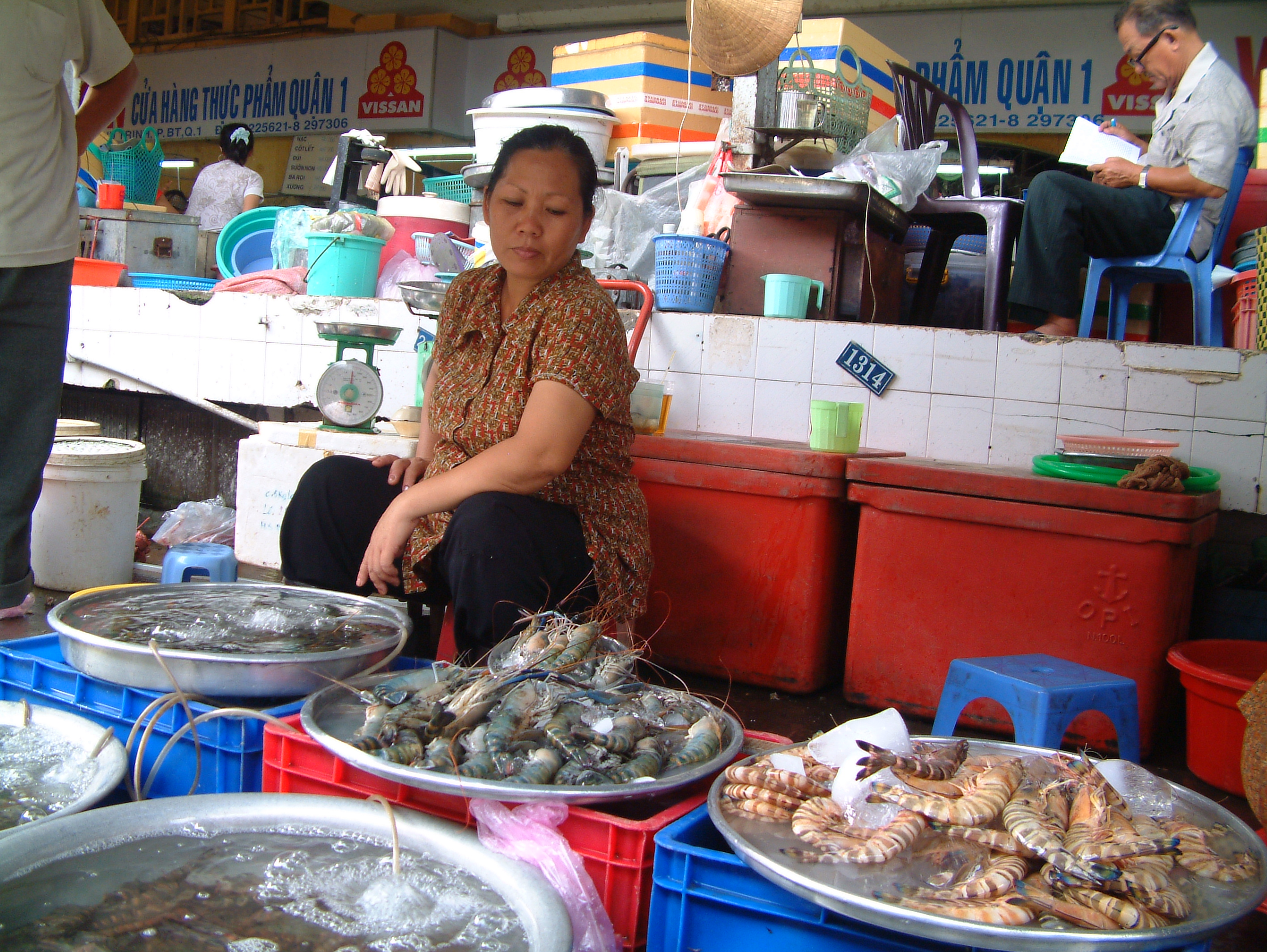 Рынок Хошимина "Бен Тхань"